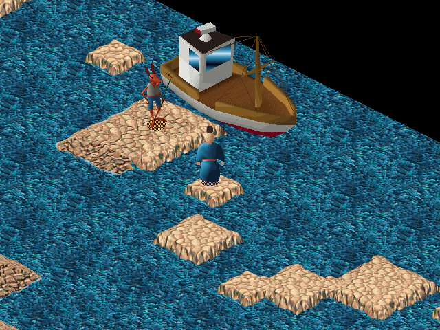 Capture d'écran du jeu vidéo Little Big Adventure (1994), développé par Adeline Software International.